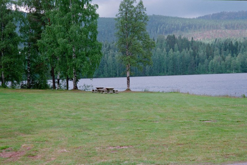 Badviken i Vidsel. (Foto: Curt Löfwenberg)